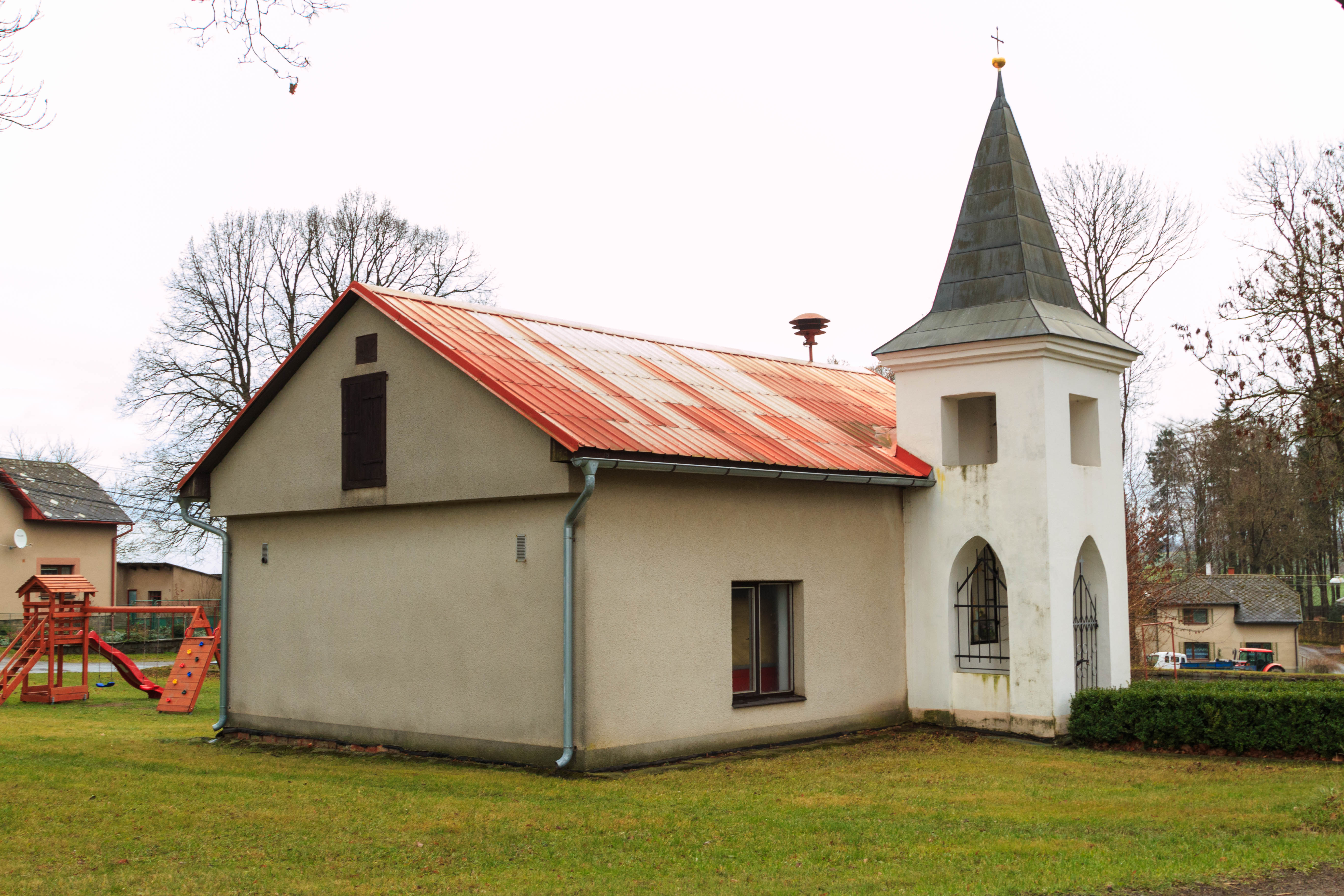 Zboží zvonička